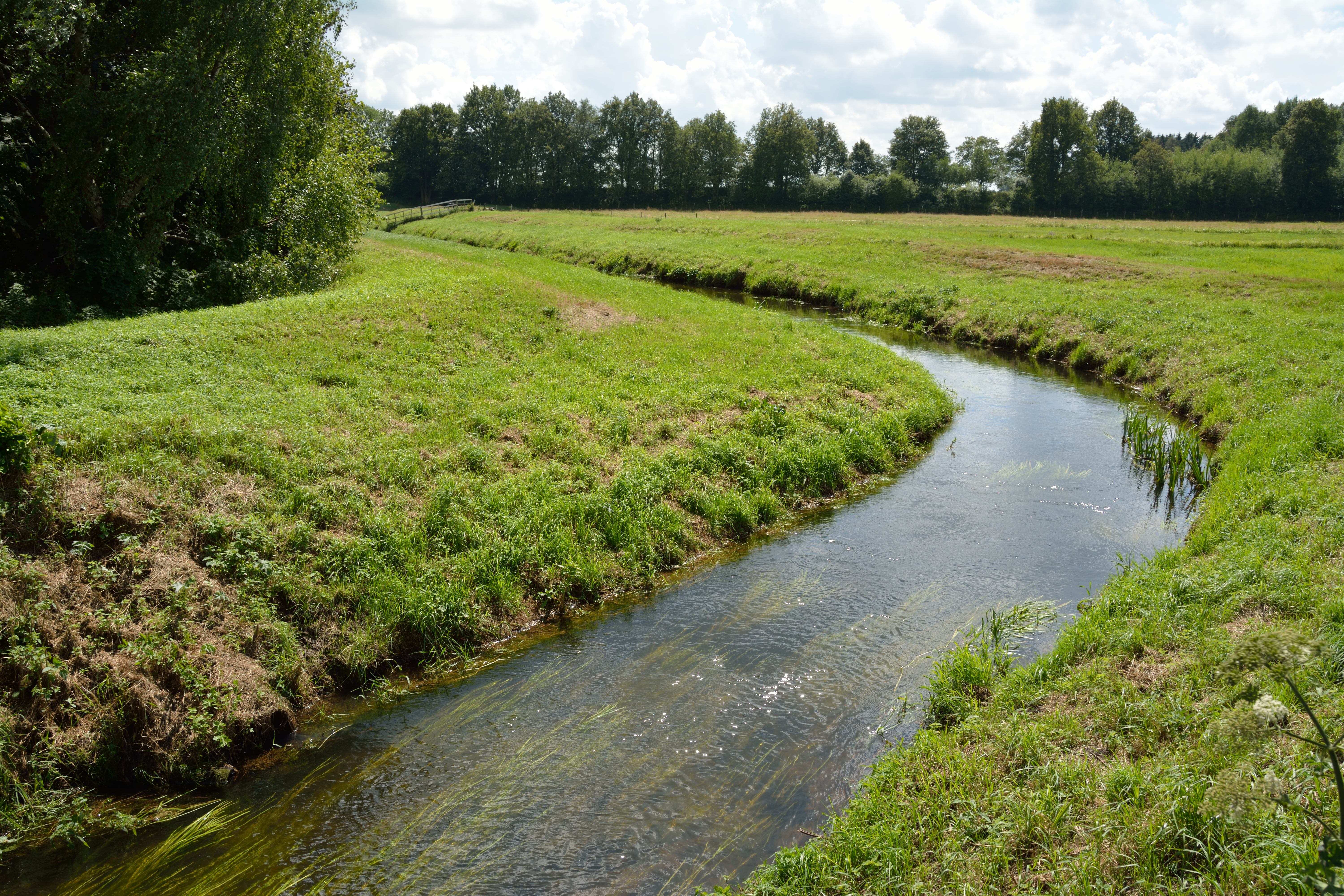 Blick auf die Mühlenbarbeker Au in Mühlenbarbek